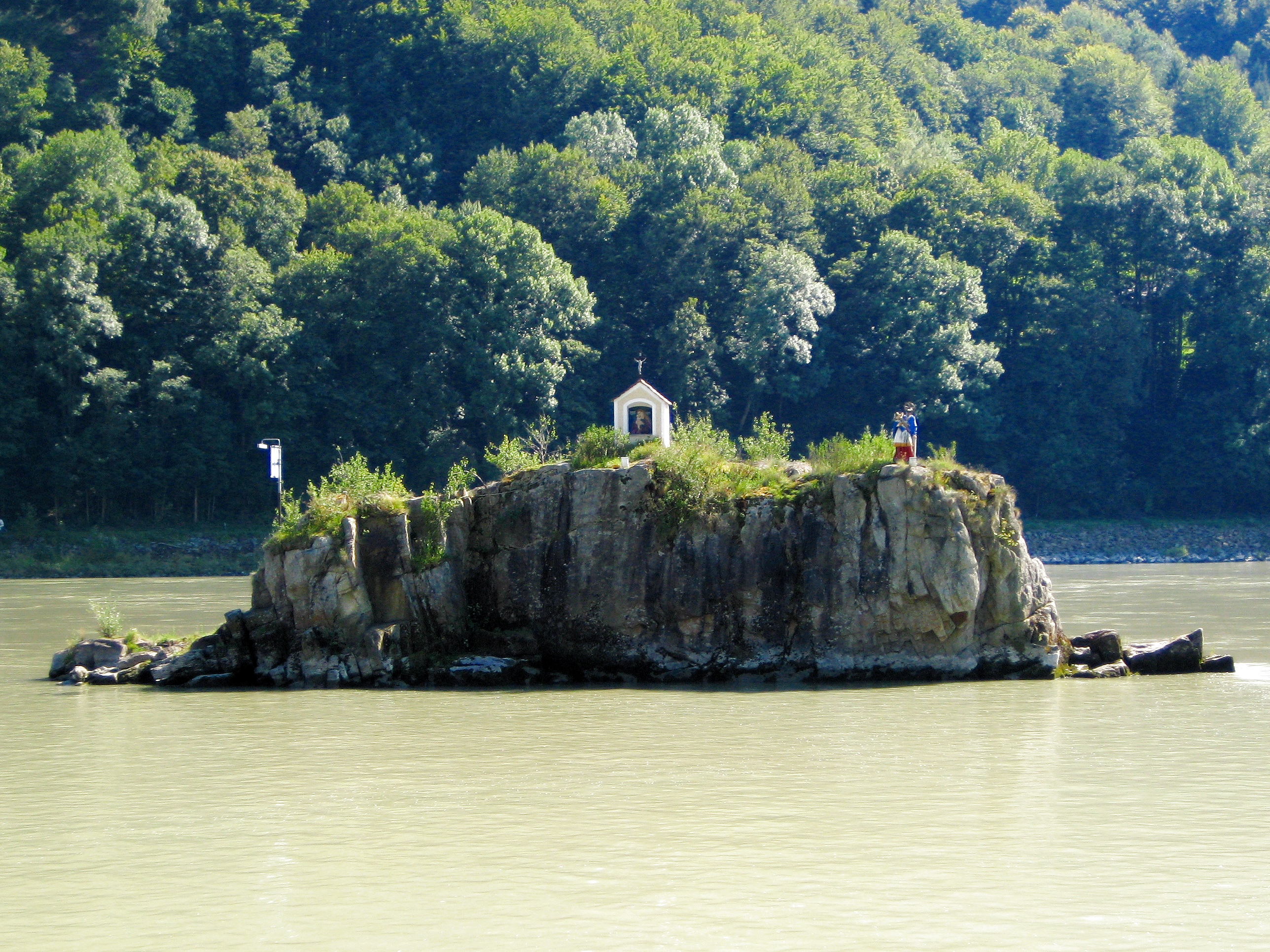 Der Jochenstein in der Donau